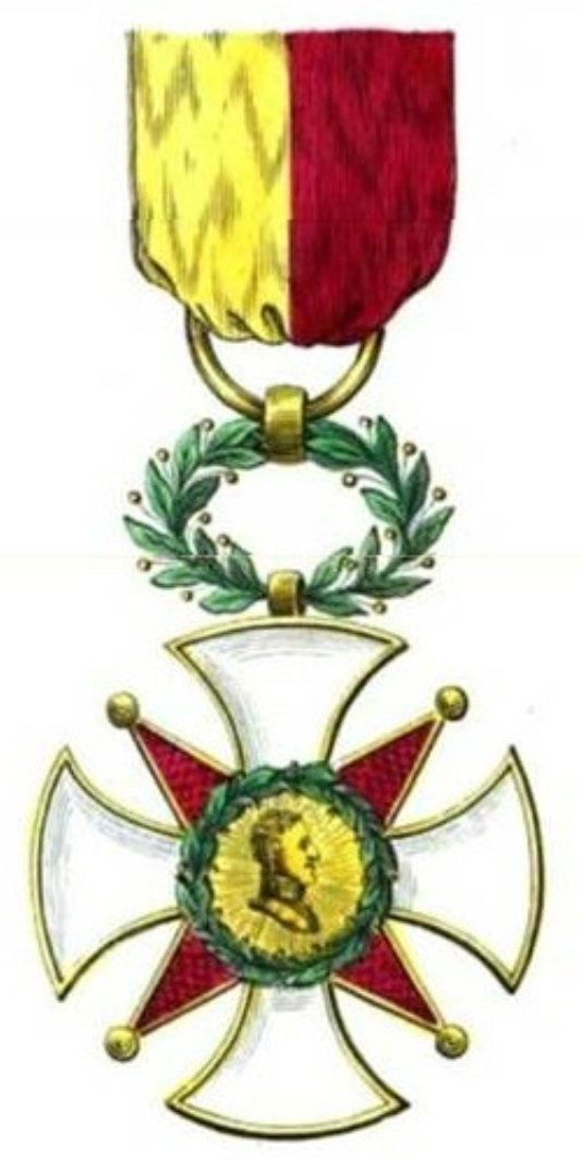 Isabel II reina de España. 1838